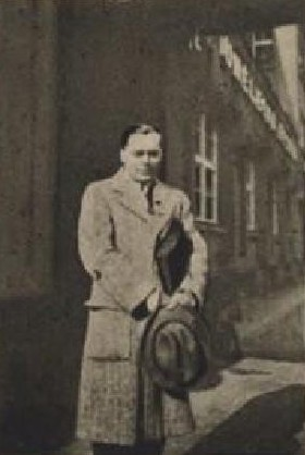 Vladimír Polívka (1896-1948), český klavírista, spisovatel a hudební skladatel a pedagog